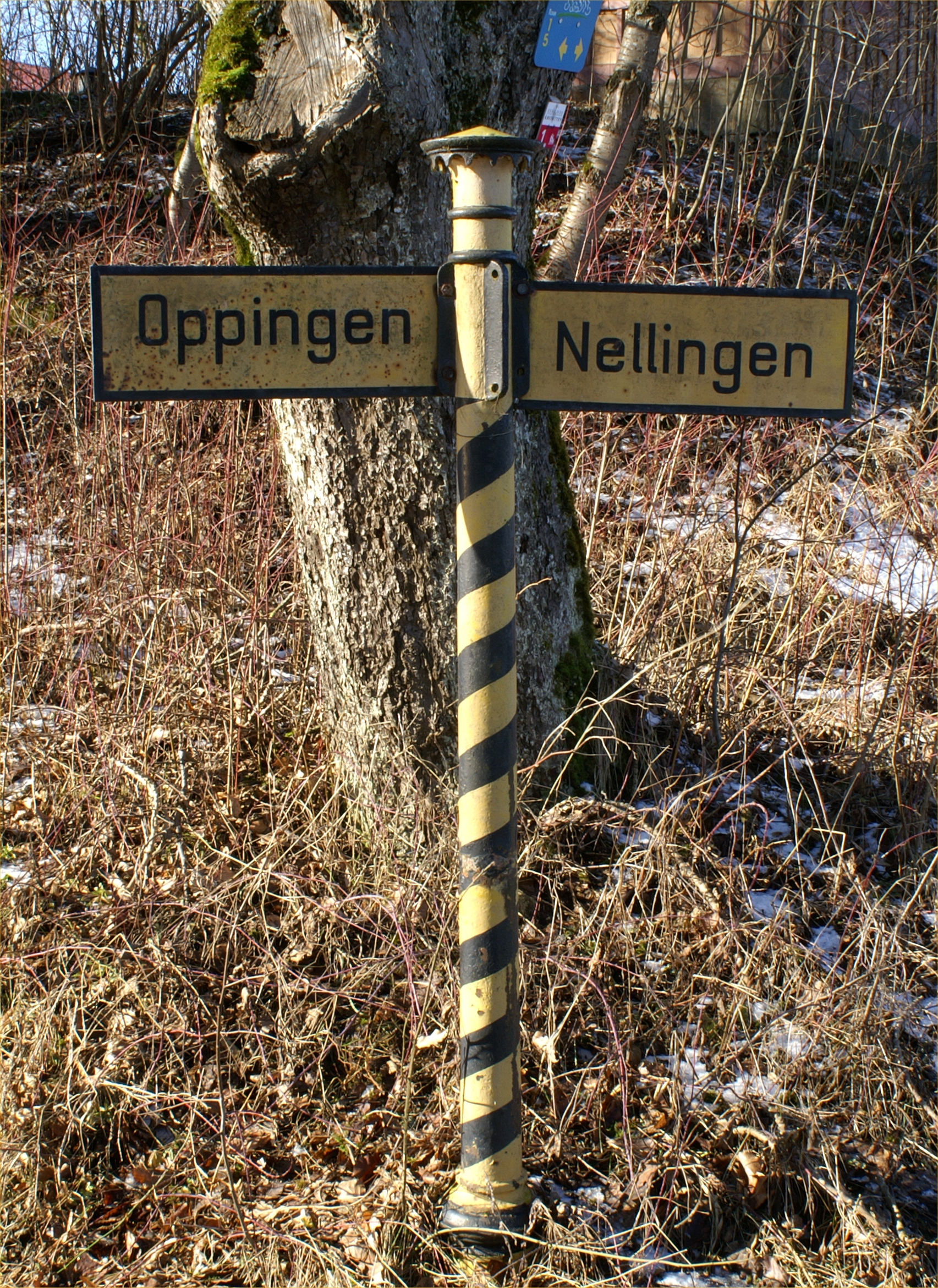 Historischer Wegweiser in Amstetten-Dorf im Alb-Donau-Kreis